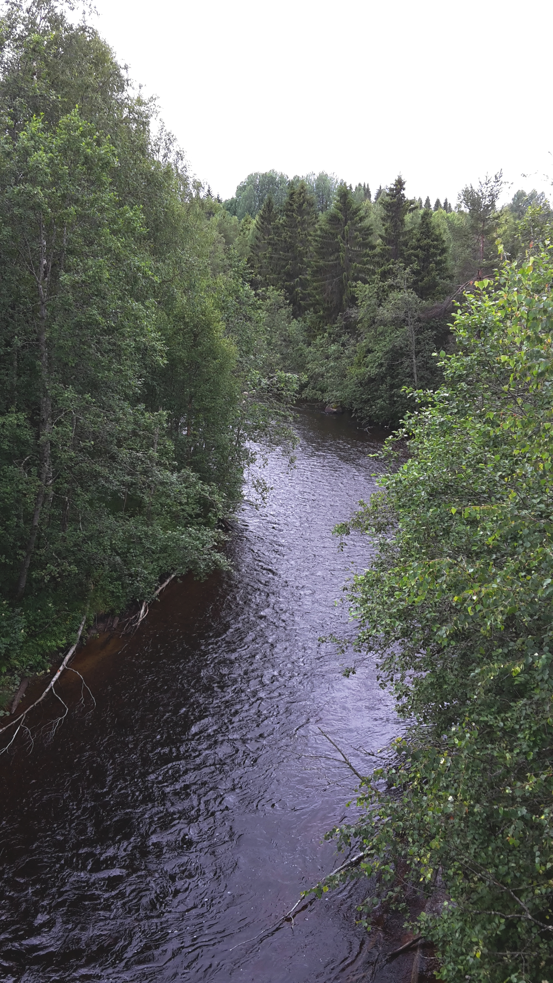 Helingsån betraktad västerut från dess östra ände, vid Hemling.